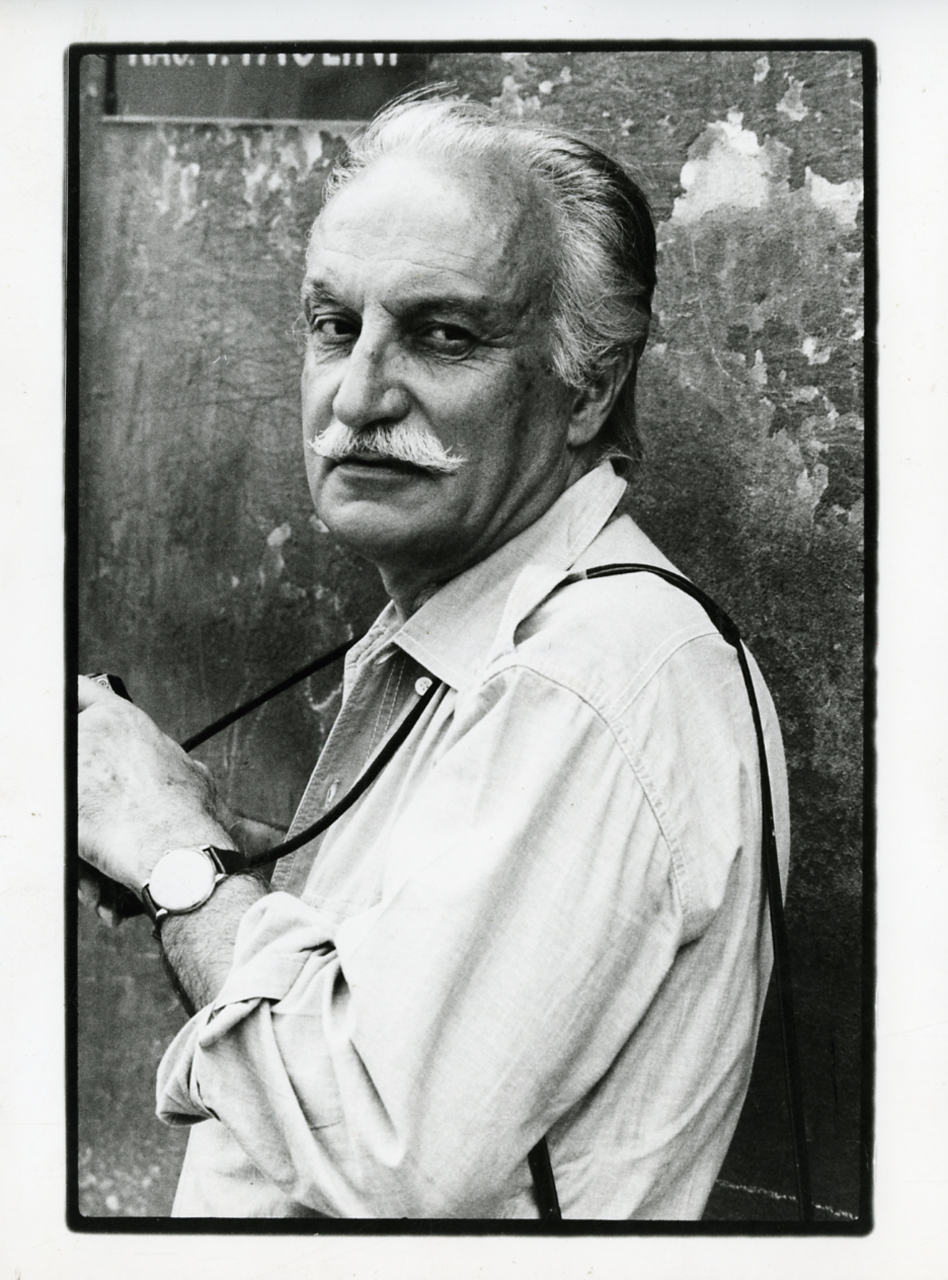 Modena. Centro storico. Ritratti di Paolo Monti durante il lavoro per il centro storico. Primi piani e ritratti ambientati. Serie fotografica : Modena, 1973 / Pino Guidolotti. - Stampe: 4 : Positivo b/n, gelatina bromuro d'argento/ carta, 18x24, 24x30. - ((Al verso delle stampe iscrizione didascalica e documentaria manoscritta a matita: "Modena - [19]73" e timbro a inchiostro con copyright: "Pino Guidolotti". - Sul coperchio della scatola iscrizione didascalica manoscritta a penna: "Sicilia/ n. 30 fotografie di Enzo Sellerio/ (1963)". - Occasione: Campagna di rilevamento del centro storico. - Fonte: Quaderno di Paolo Monti: Leica 1501-3000 Controllo numerazione (1950-1978), presso Archivio Paolo Monti